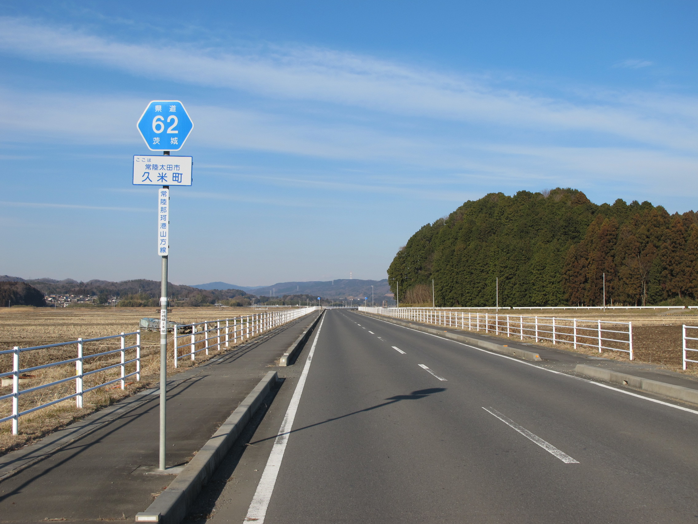 茨城県道62号常陸那珂港山方線（常陸太田市久米町）